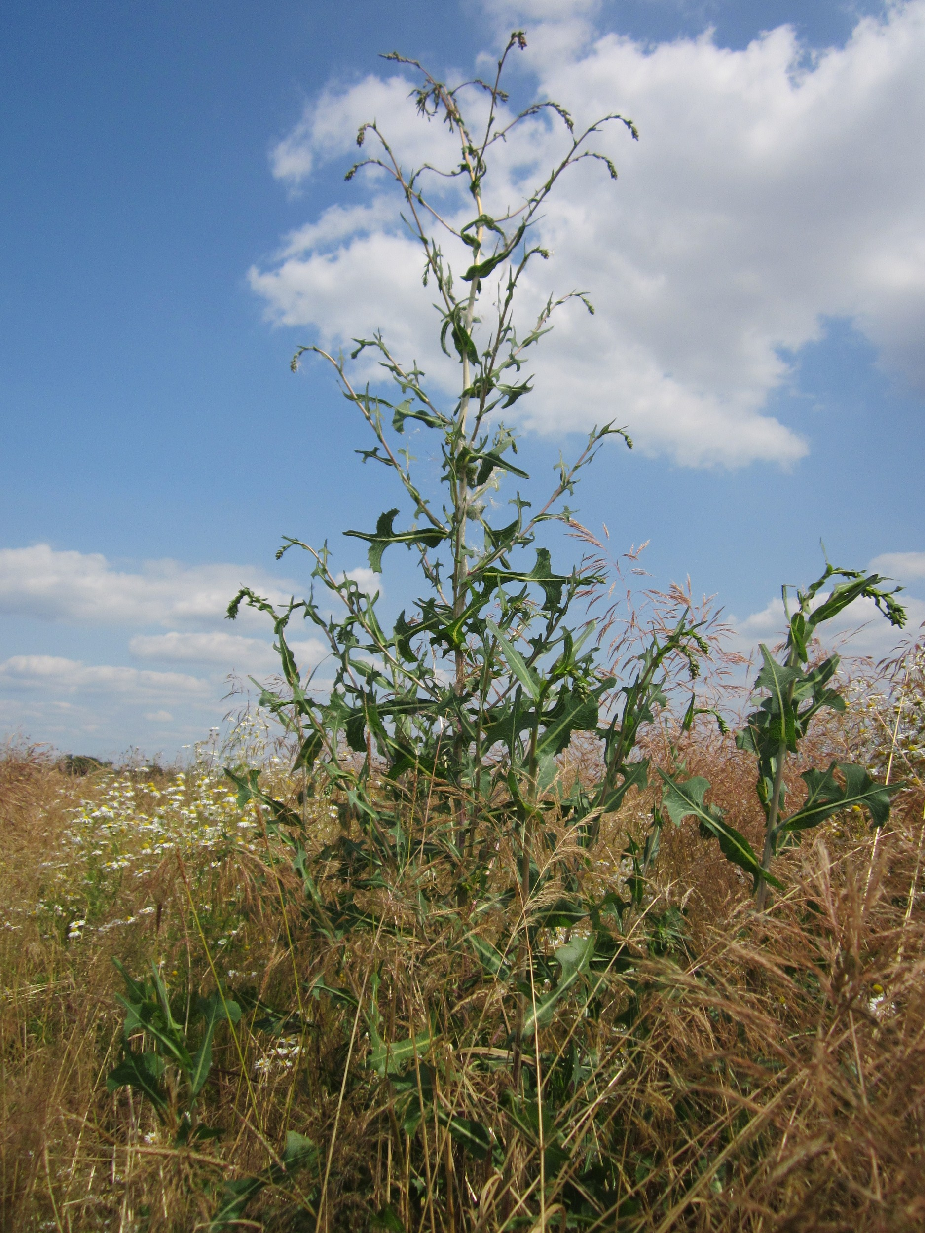 Stachel-Lattich (Lactuca serriola) bei Hockenheim